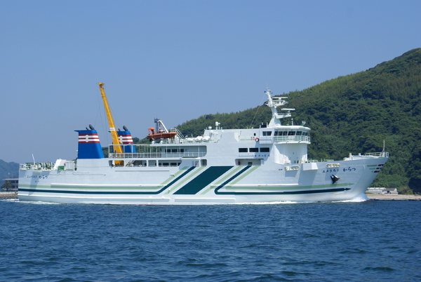 九州郵船・フェリ－「エメラルドからつ」